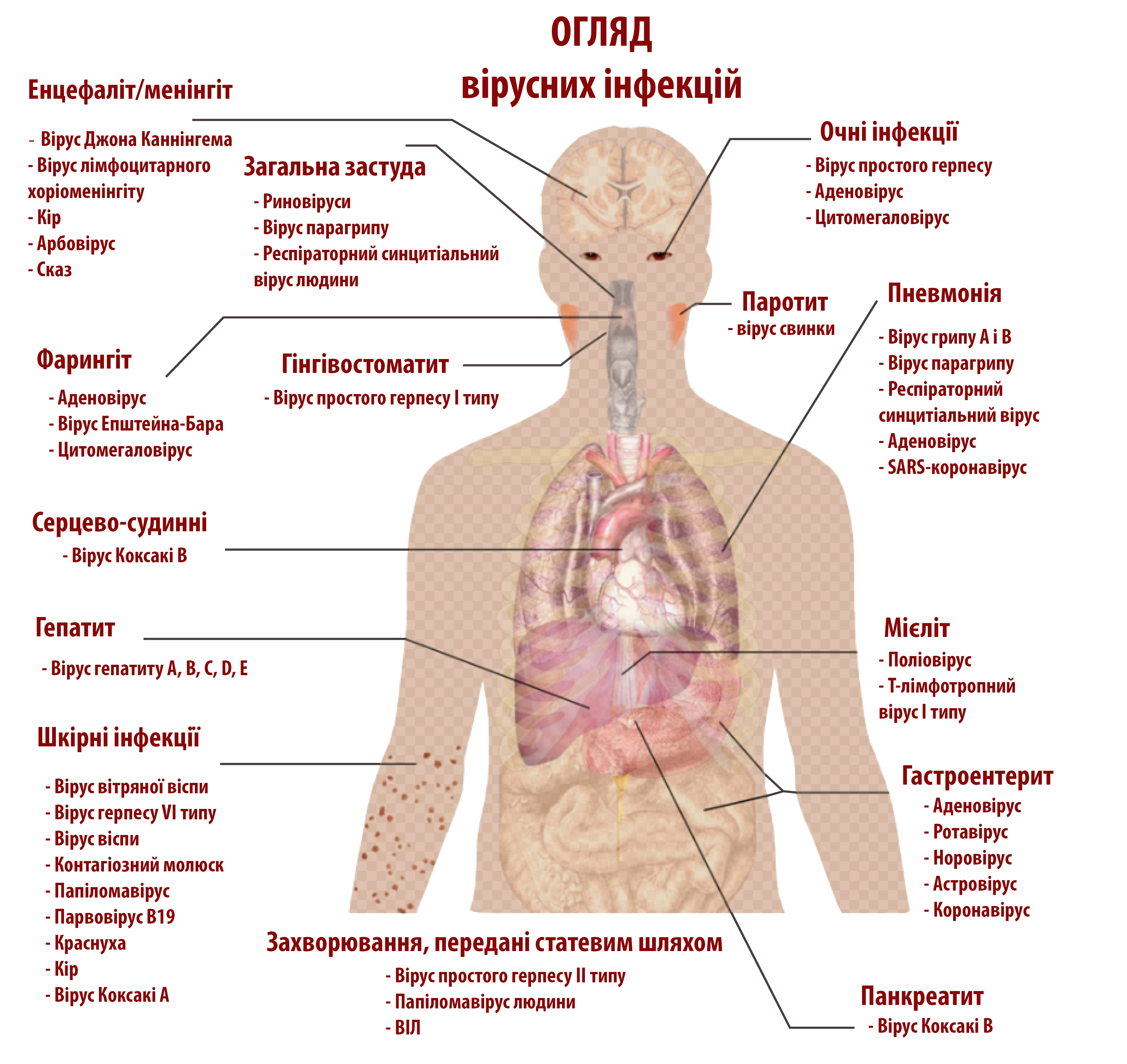 Інфографіка вірусних захворювань